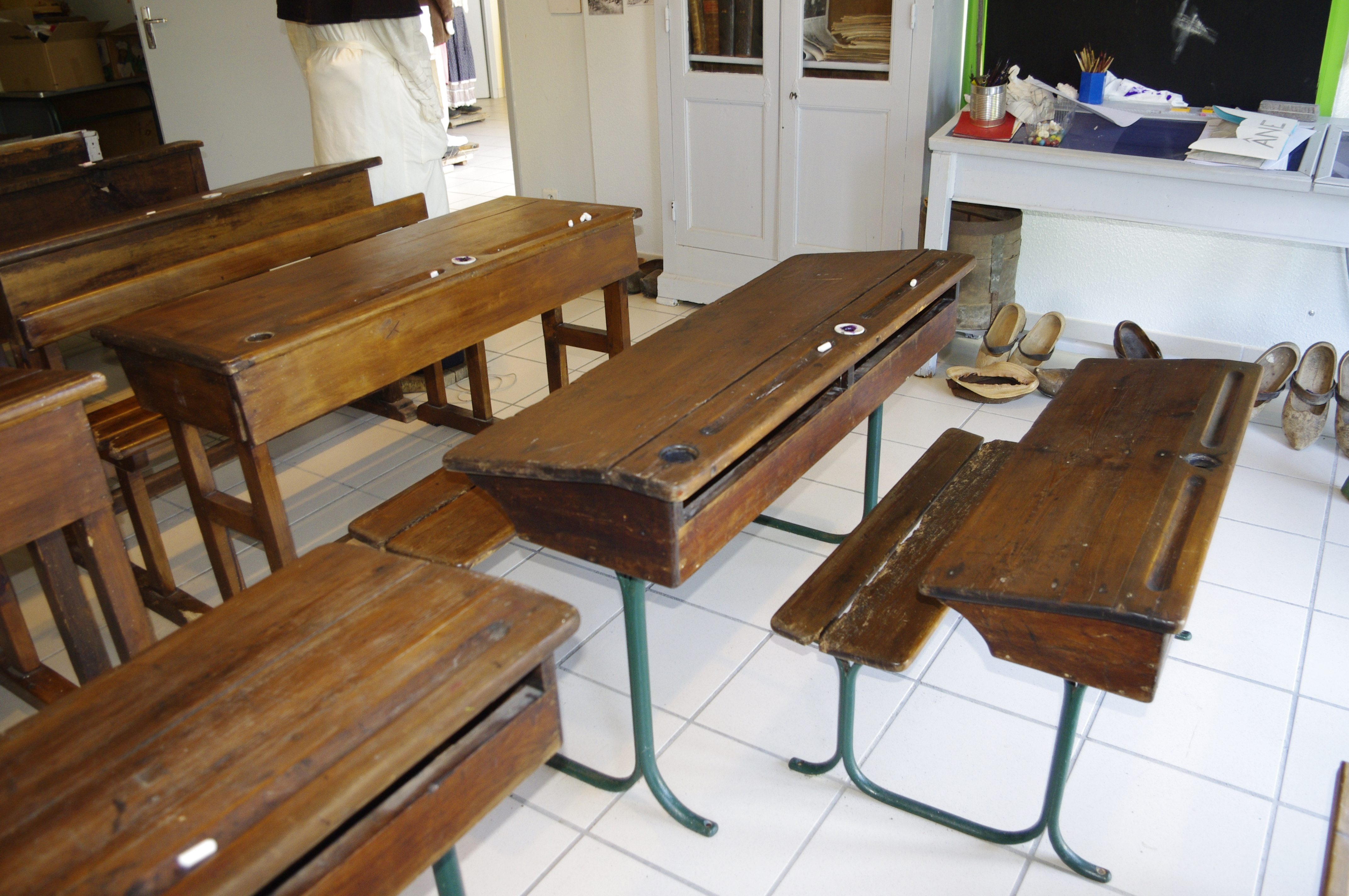 Cité Découverte Nature à Miallet, Dordogne , France. Mobilier scolaire des années 1930 à 1950.